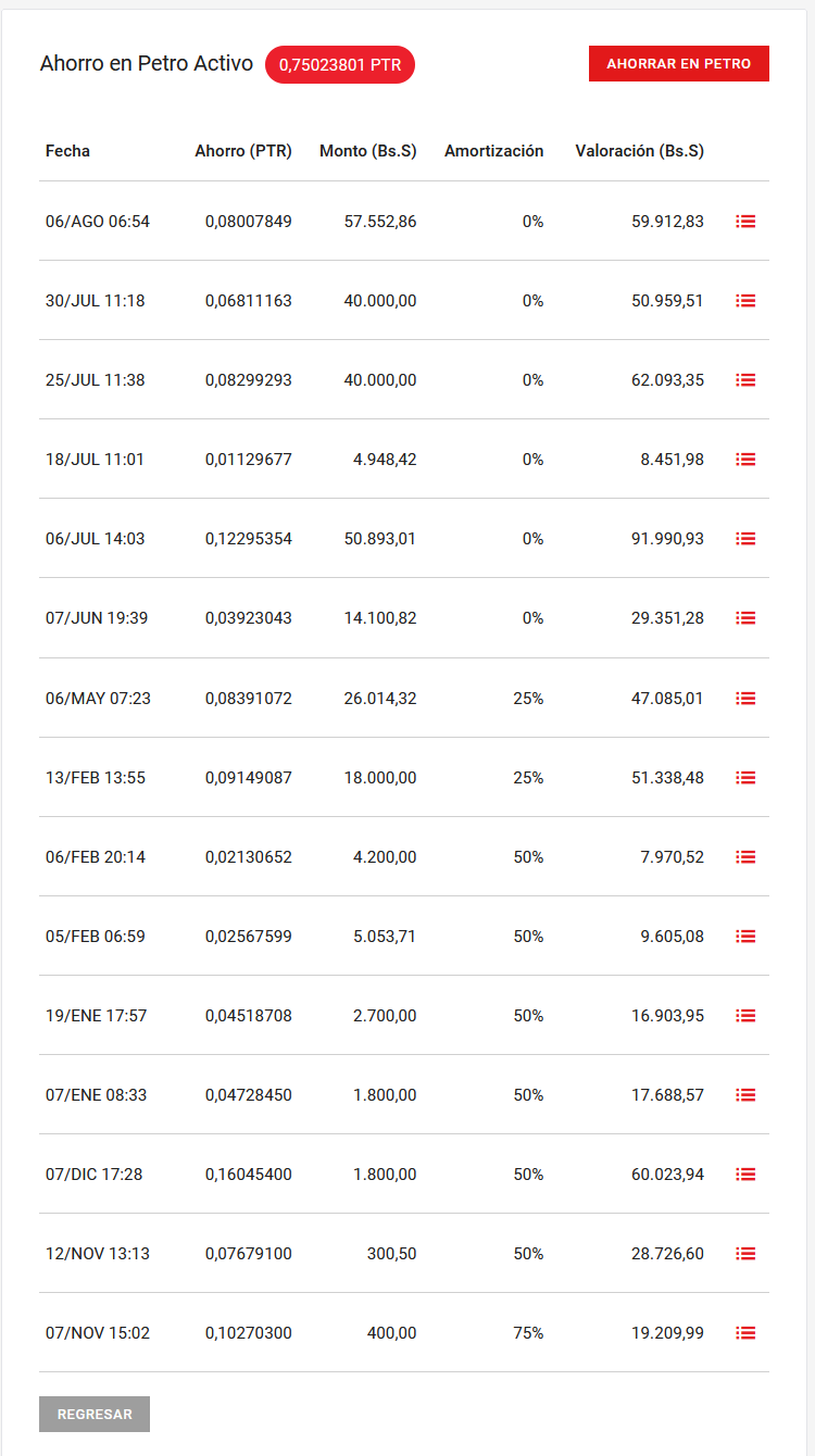 En la imagen se muestra como es el plan de Ahorro en petros de la plataforma Patria. El ahorro en petro activo indica la cantidad actual de petros que se tienen en la plataforma, Luego de izquierda a derecha: La fecha de la operacion, la cantidad en petros, lo que se pago en bolívares, el porcentaje que te han pagado y por ultimo la Valoración en Bolívares Soberano de lo que aun no te han pagado.